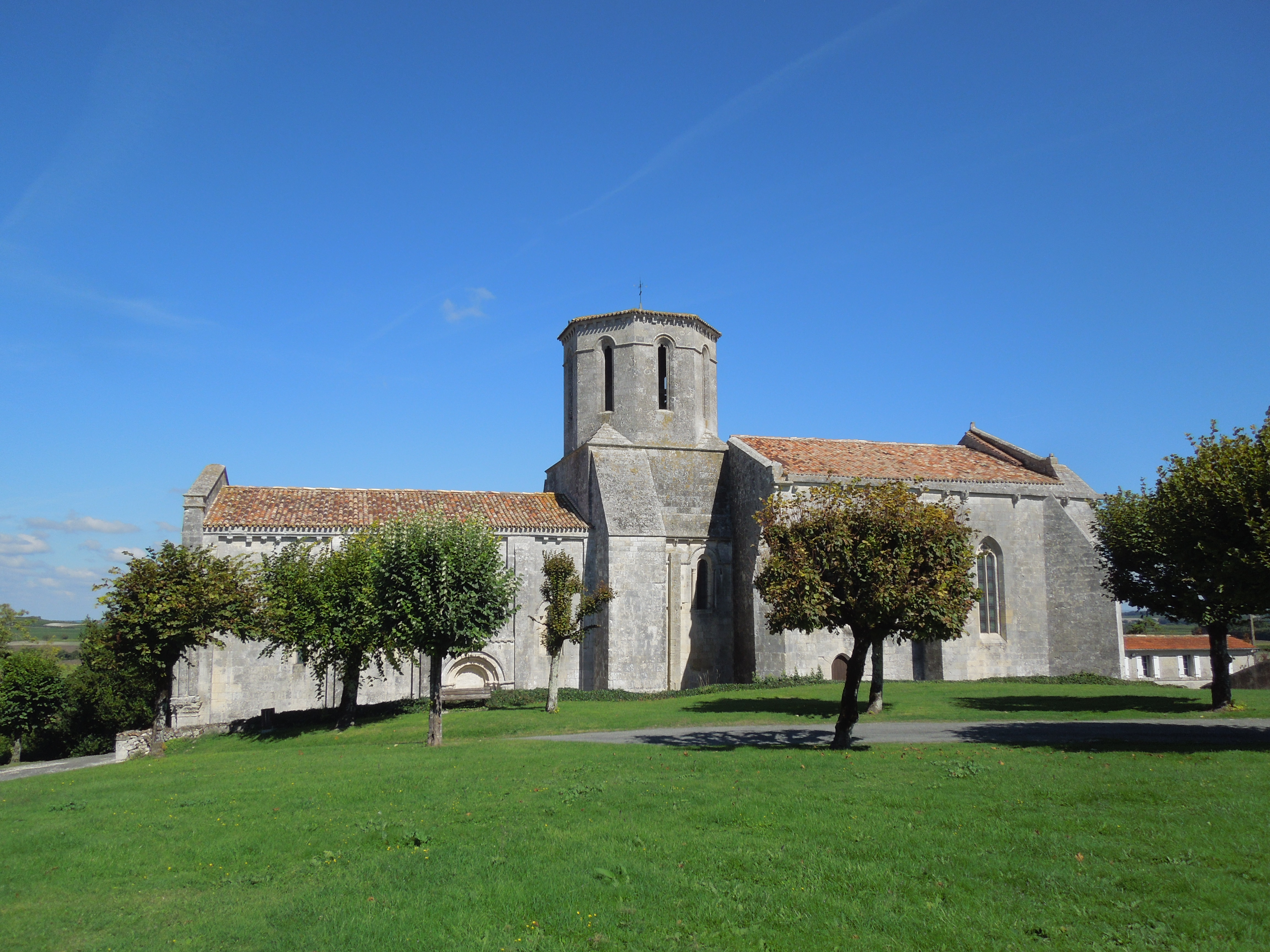 Die katholische Pfarrkirche Saint-Pierre in Échebrune